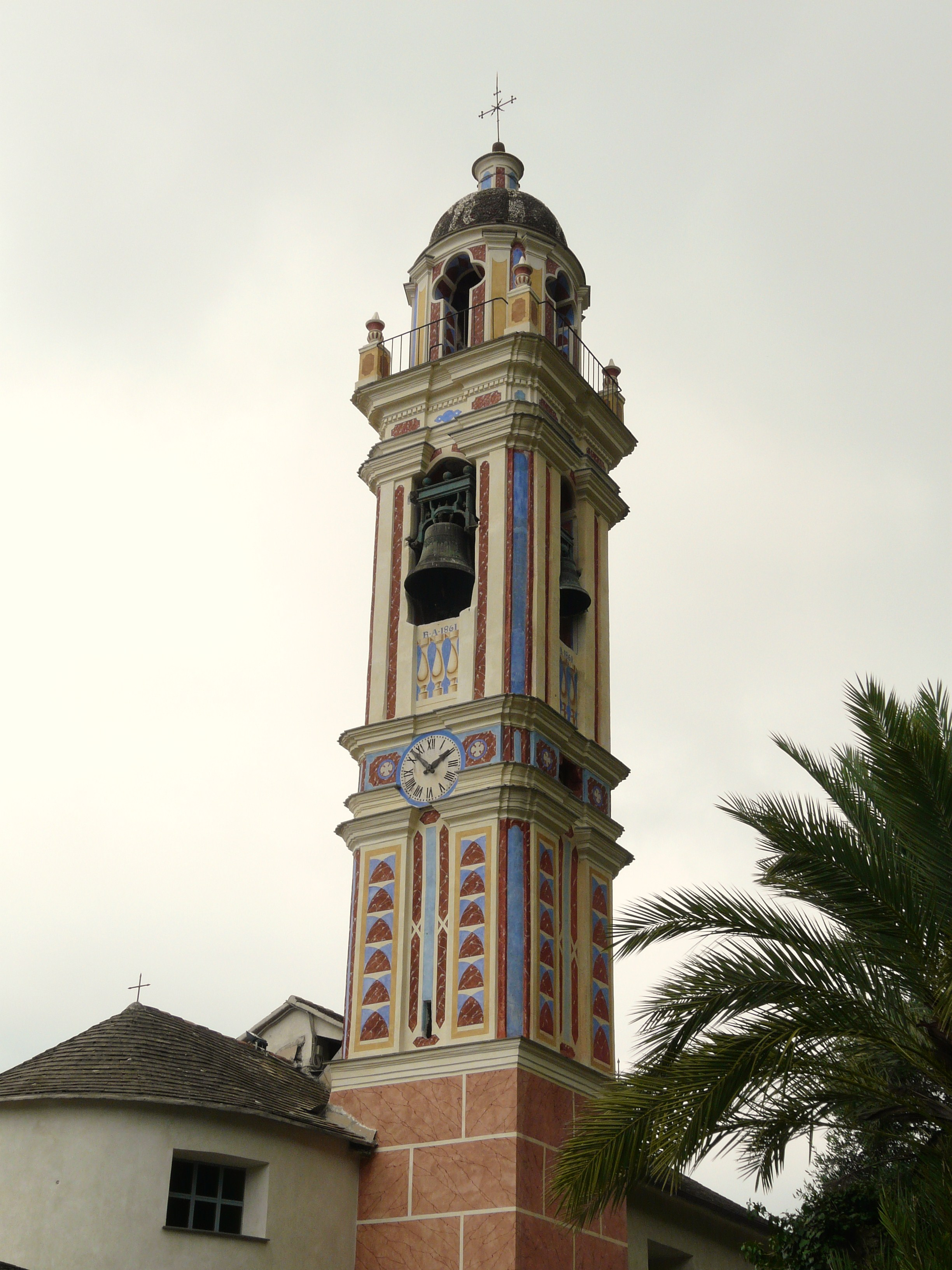 Chiesa di San Nicolò, Carasco, Liguria, Italia